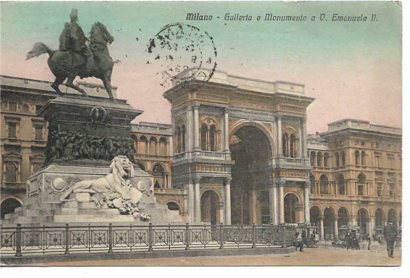 Milano - Galleria e Monumento a Vittorio Emanuele II